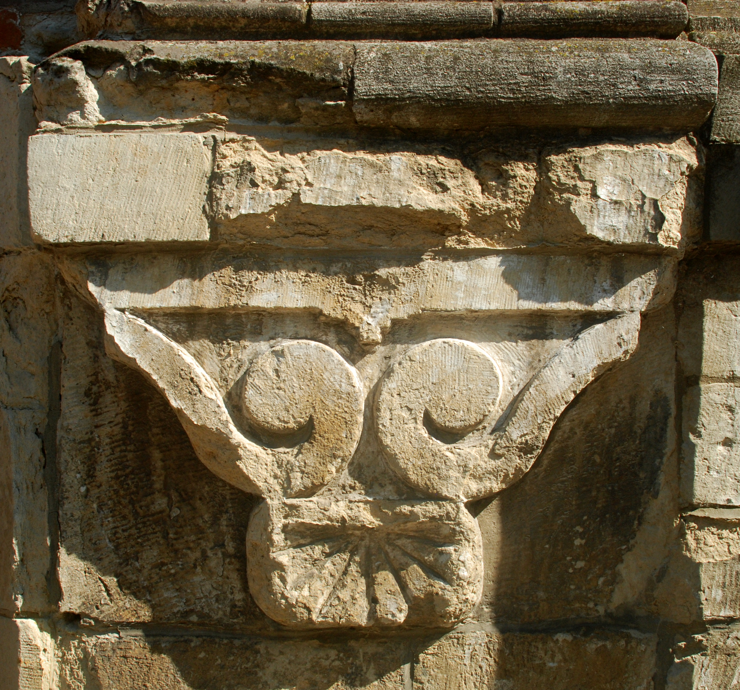 Belgique - Brabant flamand - Louvain (Leuven) - Chapelle des Sœurs Noires (Zwartzusterskapel)